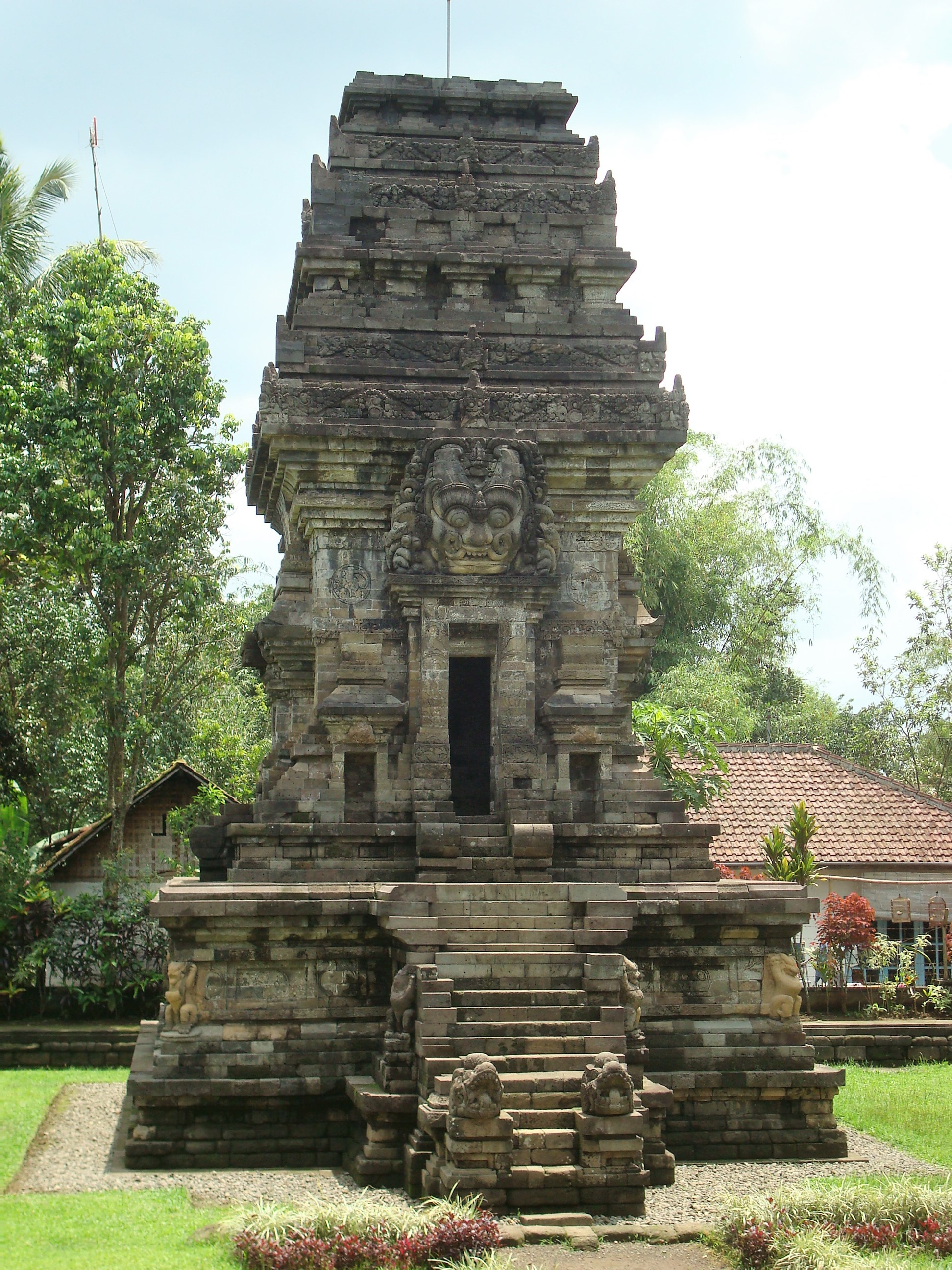 Tempel Candi Kidal